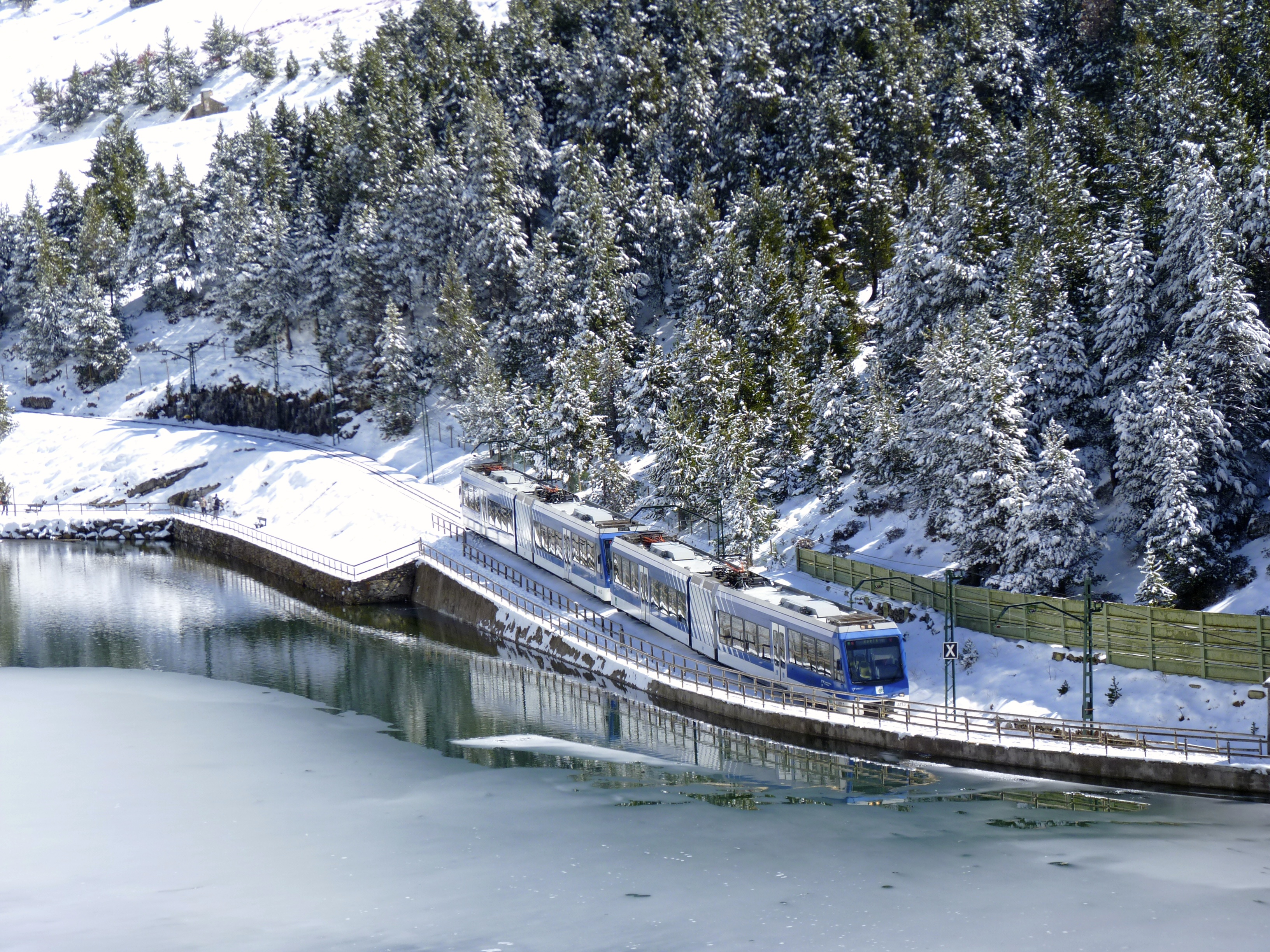 Hivern a la Vall de Núria This is a a photo of a natural area in Catalonia, Spain, with id: ES510095